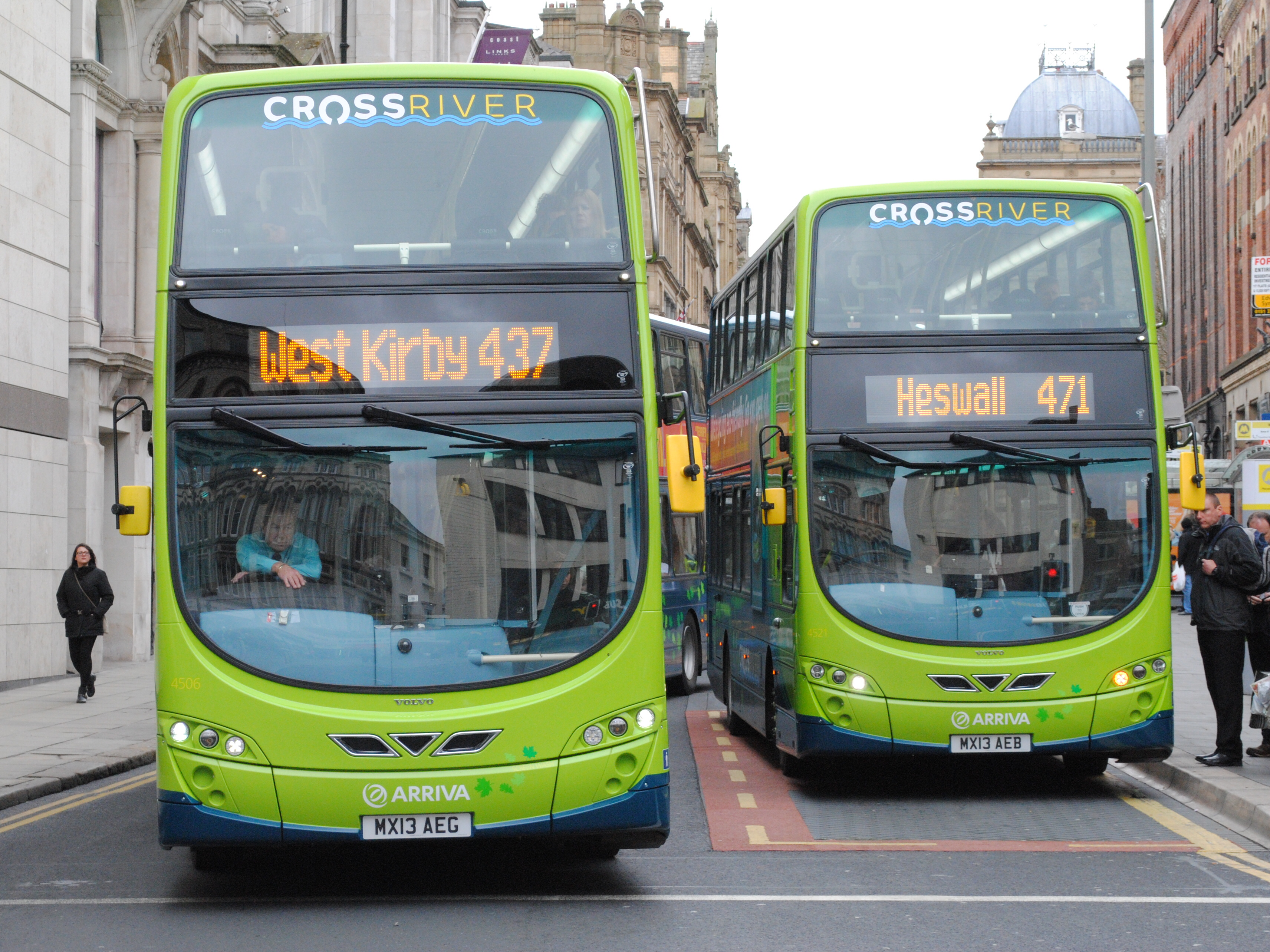 Volvo B5L Wright Gemini 2 Hybird's